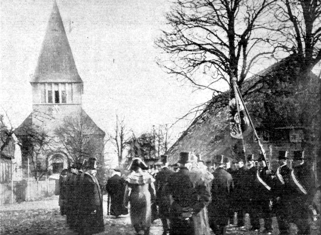 Die Ehrengäste begeben sich am Sonntag, dem 19. Dezember 1915 zum Einweihungsgottesdienst des Kirchenumbaues zu Nusse.